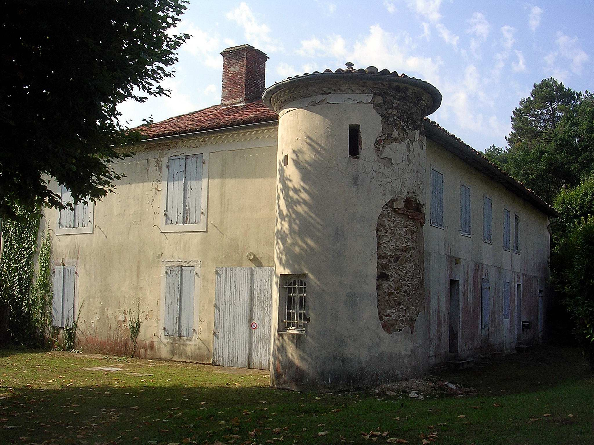 Plus vieille maison de Mimizan, datant du XVIe siècle, ancien logement des moines du prieuré bénédictin.